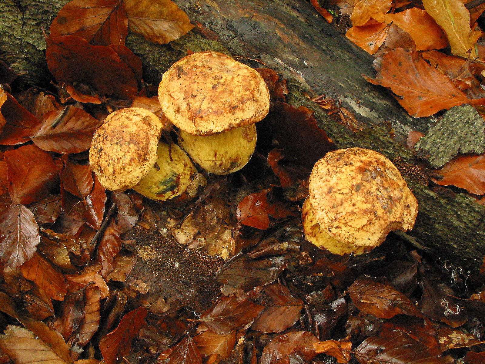 Boletus junquilleus (Belgique)/(Belgium), forêt de hêtres et de chênes./beeches and oaks forest.